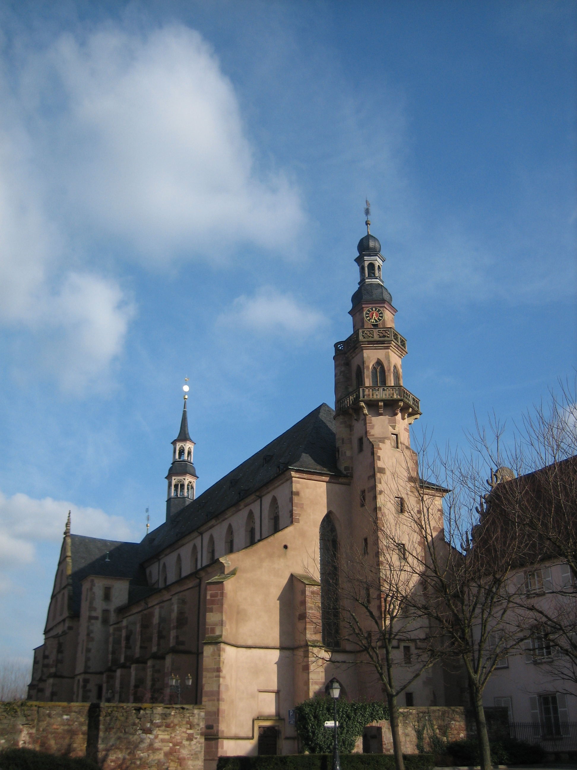 Église des Jésuites, Molsheim, France